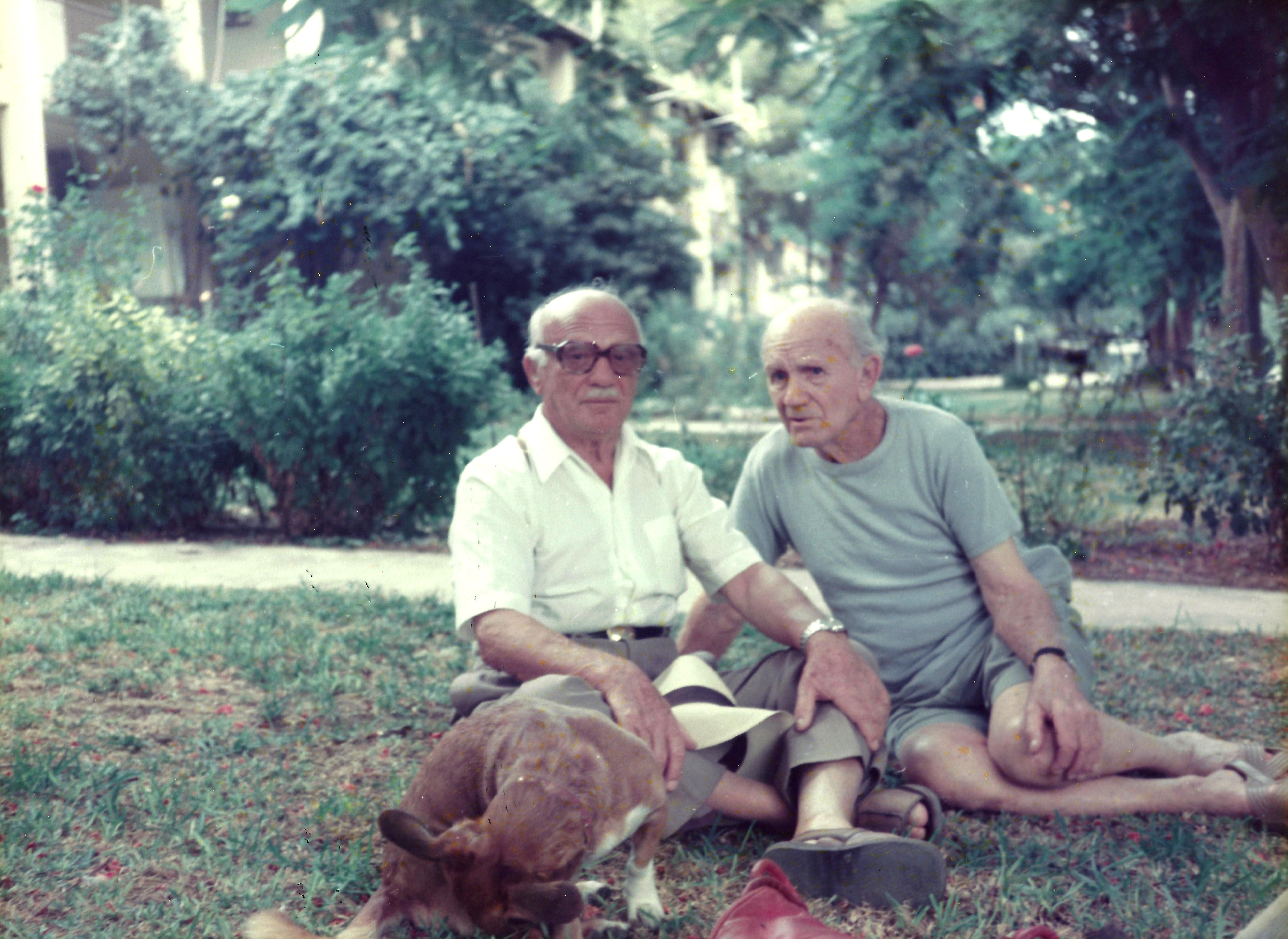 מימין אהרון שידלובסקי היה איש העלייה השנייה וממייסדי קבוצת כנרת. בתמונה עם אחיו התעשיין יוסף שידלובסקי שהיה ממציא ותעשיין מנועים צרפתי-יהודי